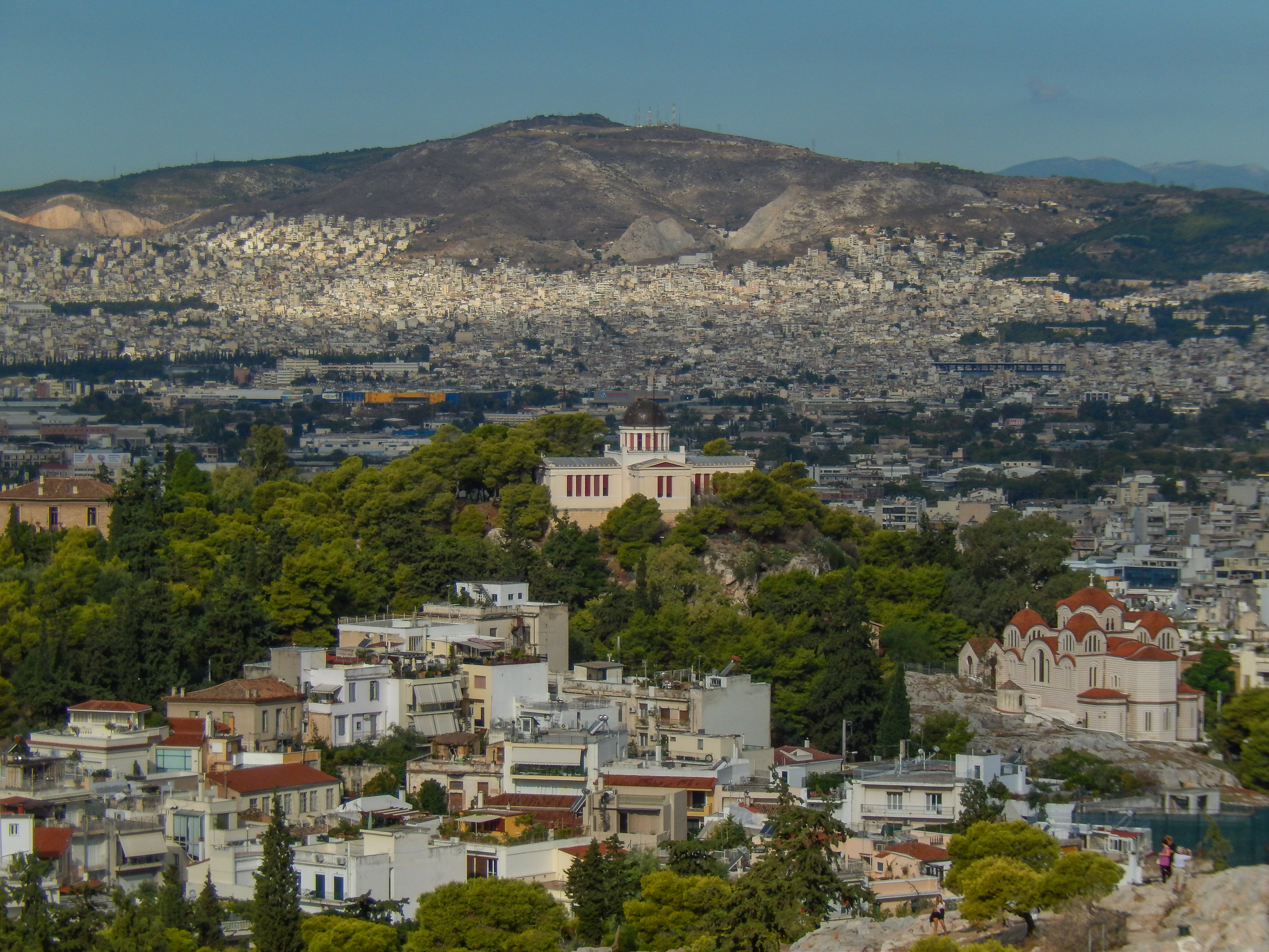 Blick von der Akropolis zum Nationalen Observatorium, Athen.